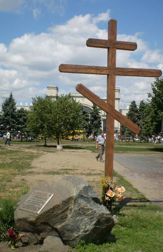 Дніпропетровськ. Меморіальний хрест "Українцям. Мільйонами вбитих голодом 1920-23, 1932-33, 1946-47; політв’язням і репресованим України, знищених в концтаборах СРСР комуністичною владою 1917-91 рр. Від нащадків 26.11.2005. Memory of Holodomor Victims 1920-23, 1932-33, 1946-47; victims of soviet communist Political repression 1917-91/ Built in 2005